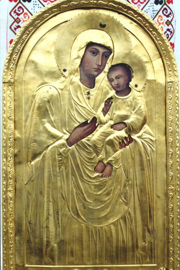 Песчанская чудотворная икона Богоматери